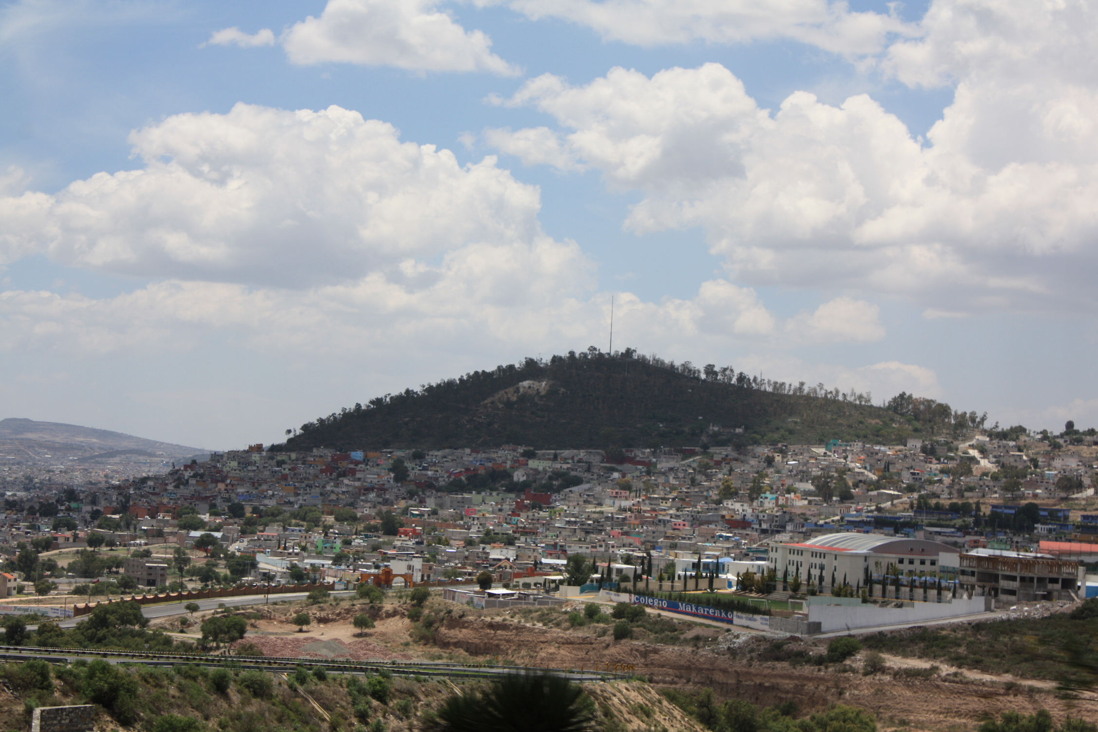 Vista de Pachuca